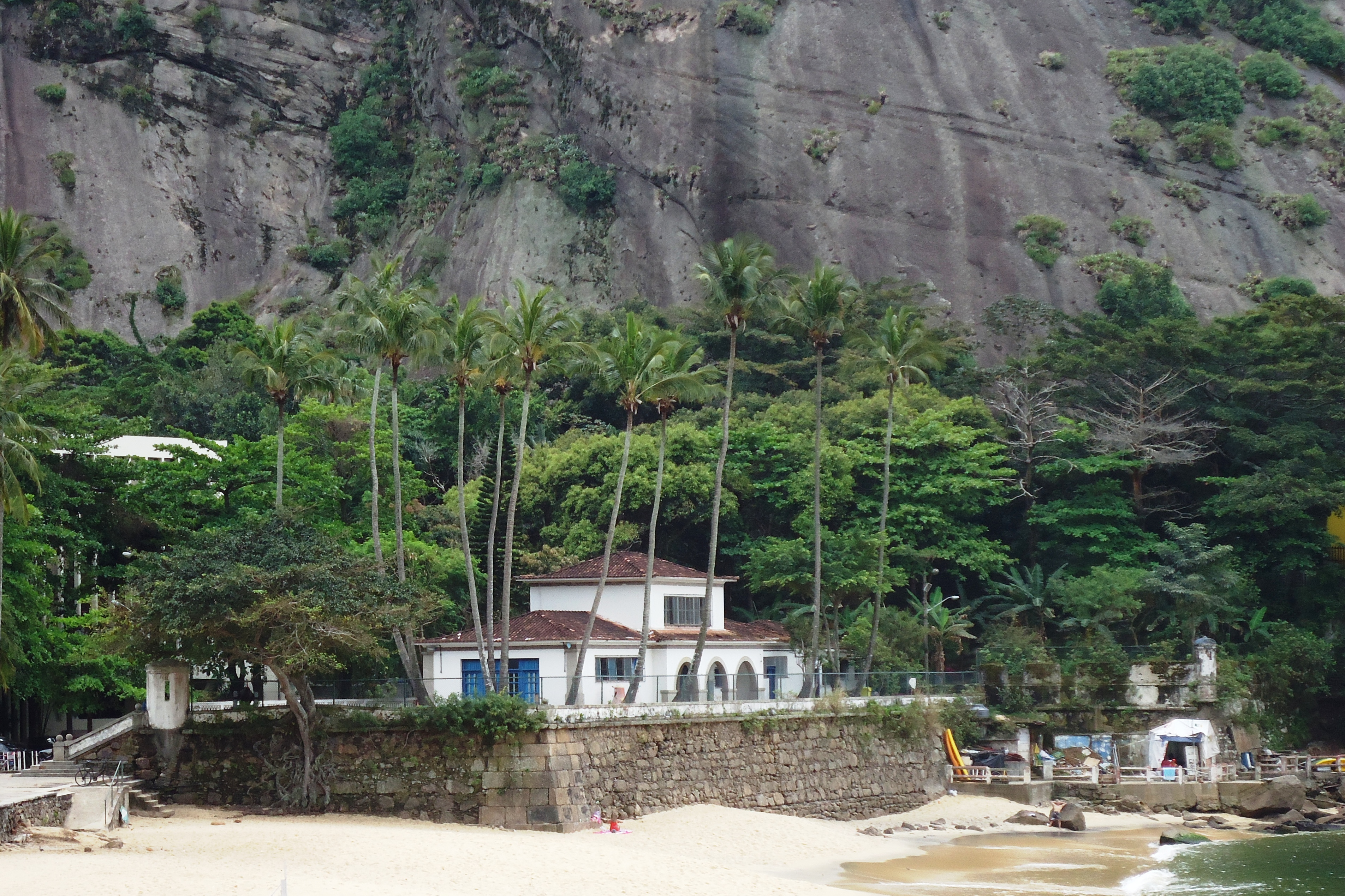 Praia Vermelha, cidade e estado do Rio de Janeiro, Brasil: antigo baluarte do Forte da Praia Vermelha.